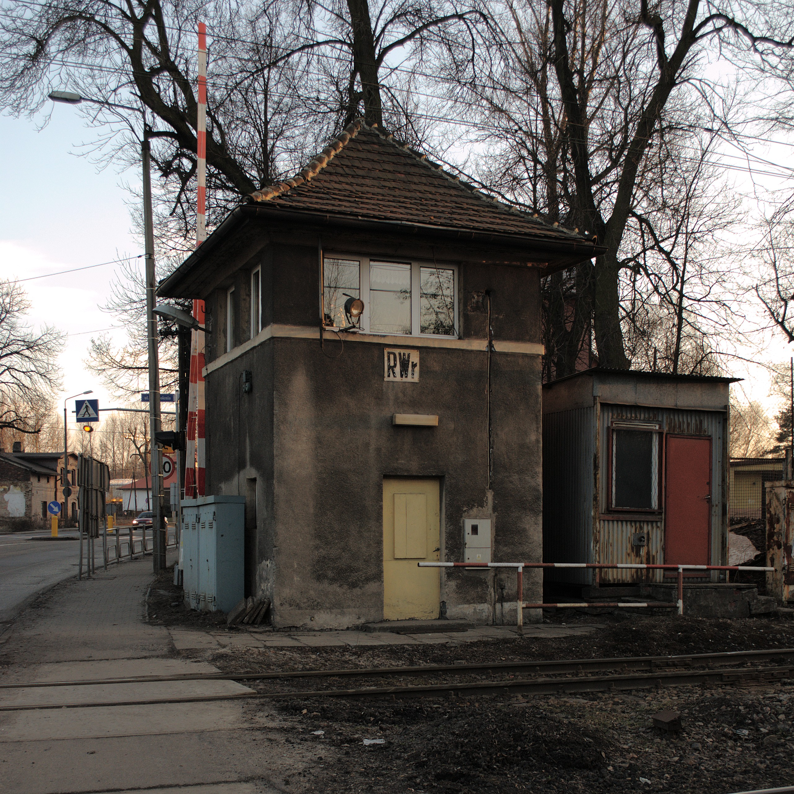 Ruda Śląska. Przystanek odstępowy Ruda Śląska Wirek. Nastawnia RWr.